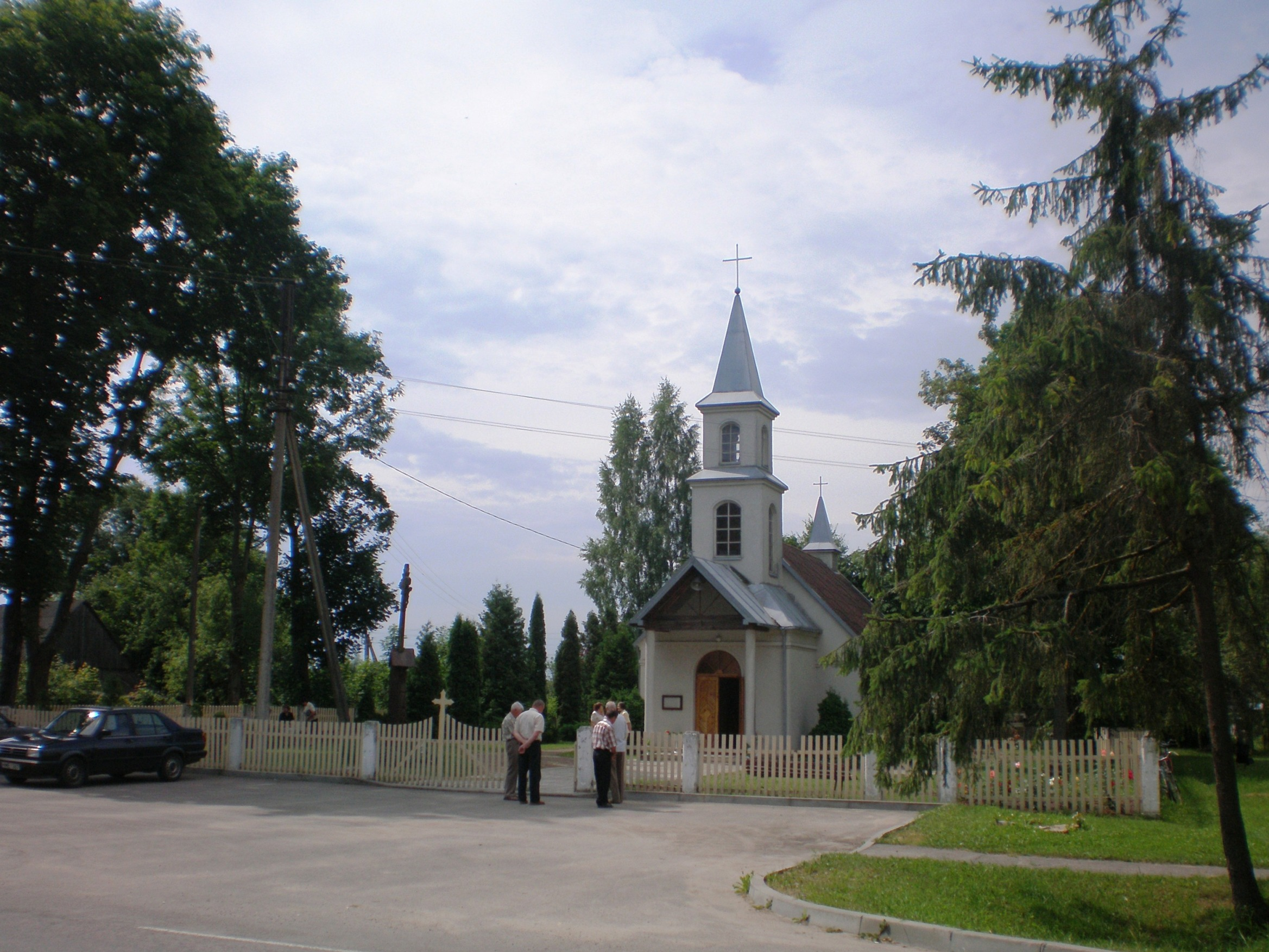 Bažnyčia, Žalioji, Vilkaviškio raj.